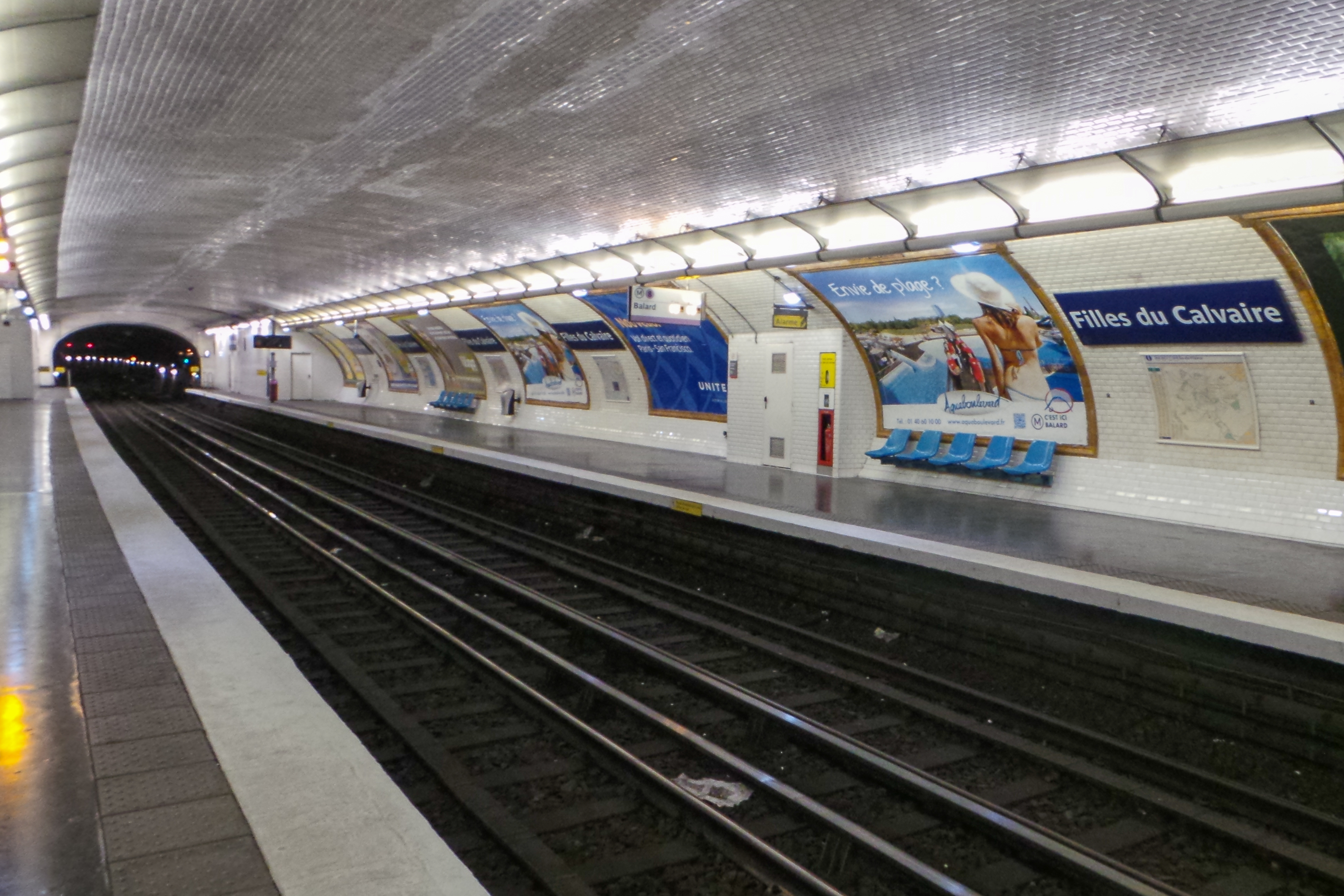 Station de métro Filles du Calvaire, métro de Paris ligne 8, Paris, France